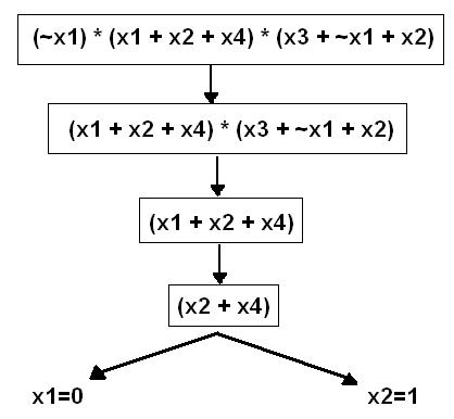 Tabela do exemplo